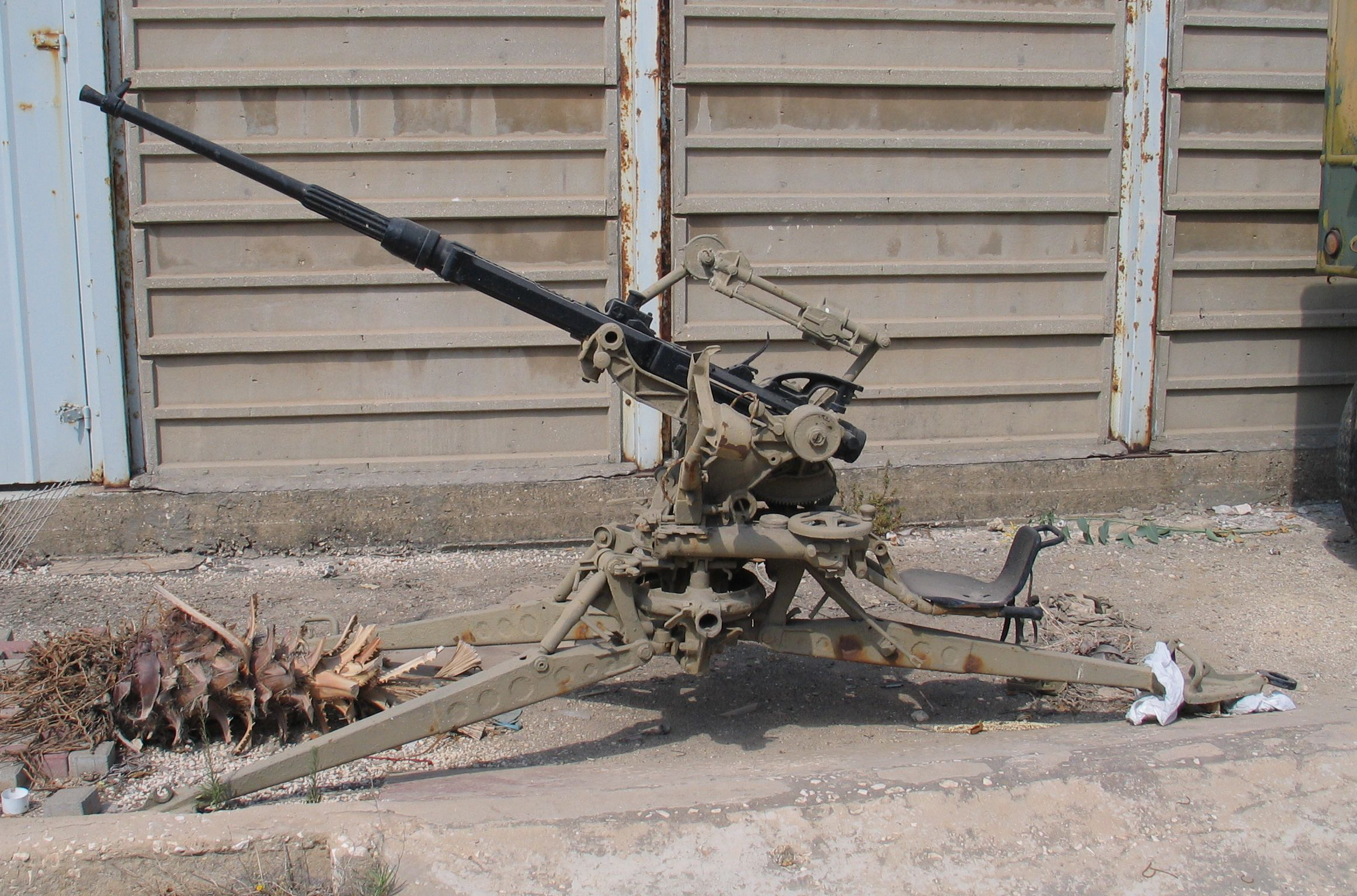 Oerlikon 20 mm AA gun in Batey ha-Osef Museum, Tel Aviv, Israel.